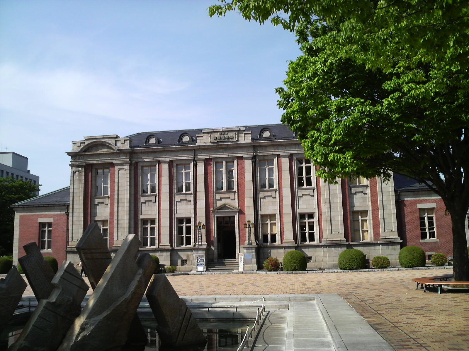 山形県山形市旧県庁文翔館隣の旧県会議事堂